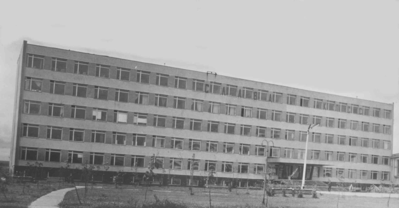 5 корпус ІФНТУНГ 1960-х років